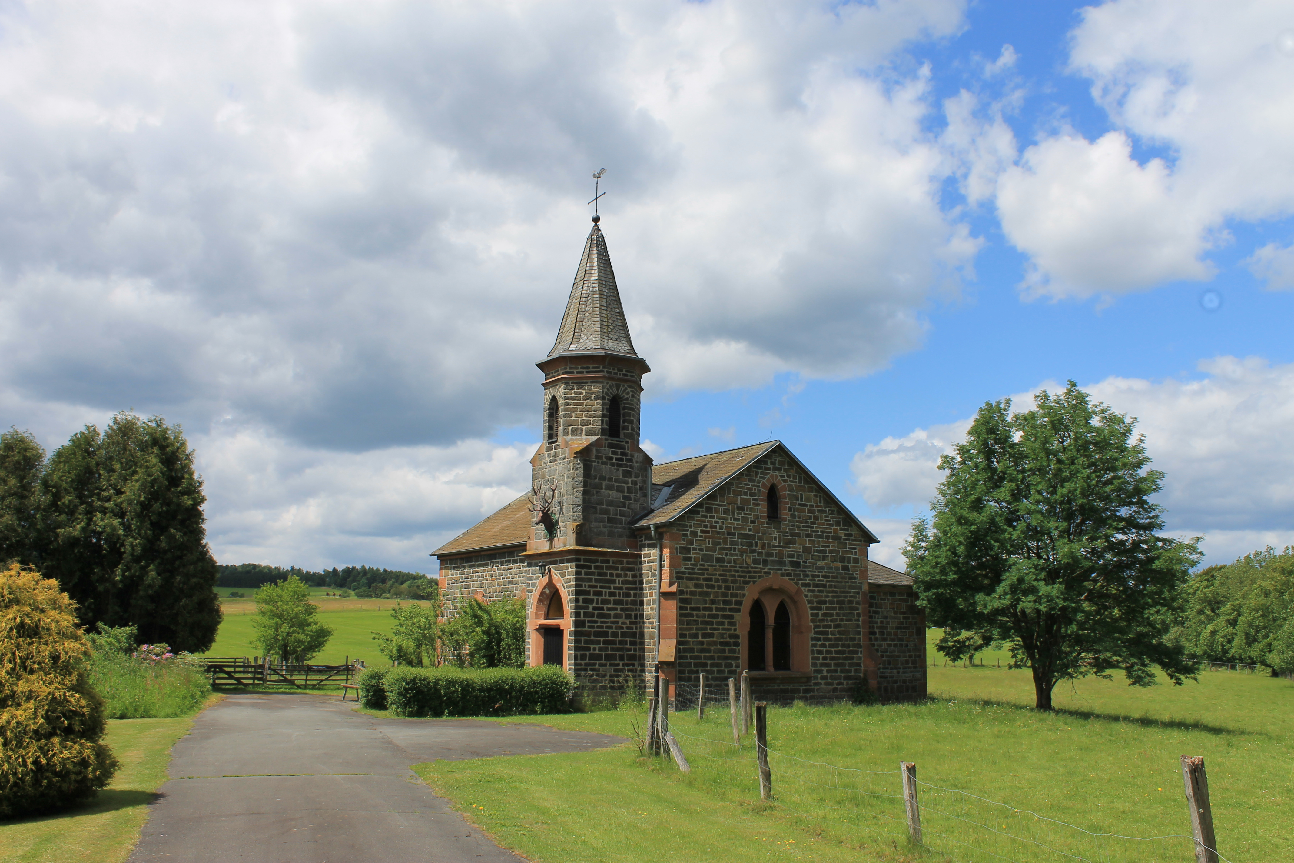 Katholische Kirche St. Hubertus zu Hatzfeld